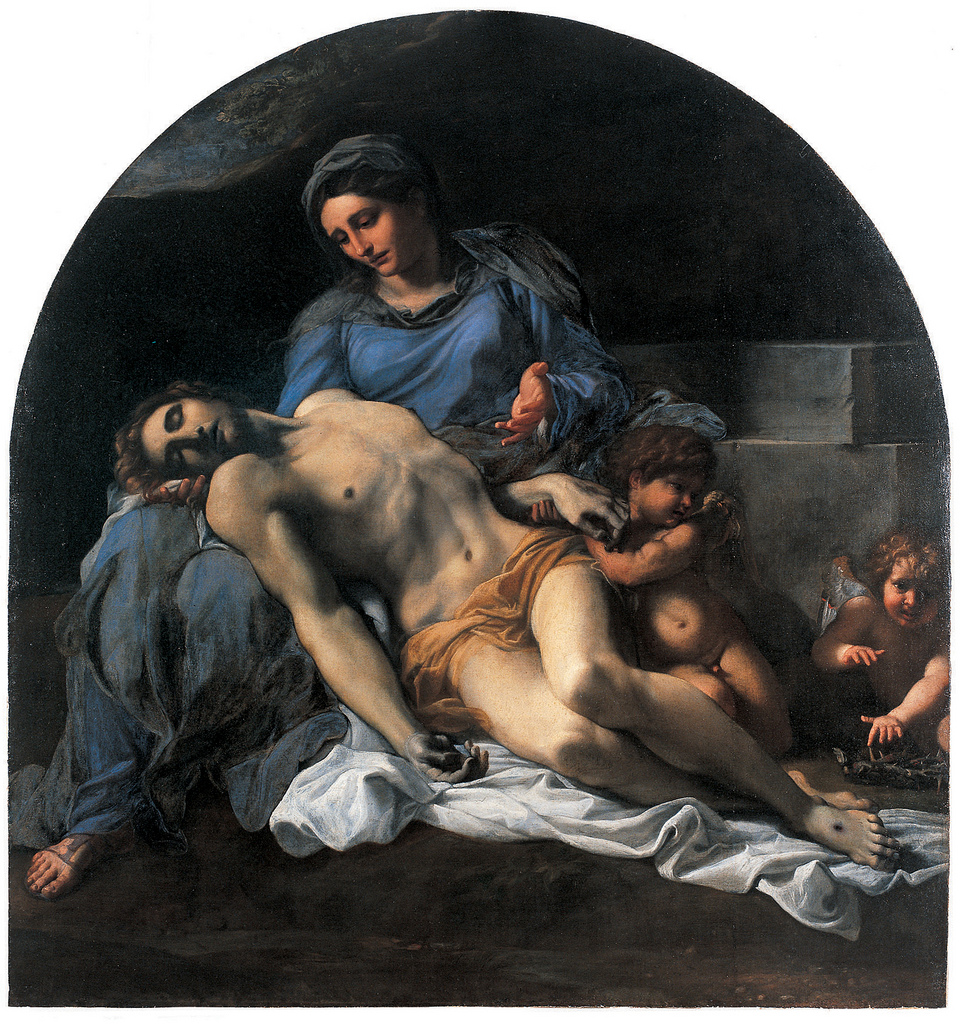 La Pietà di Annibale Carracci è un quadro (olio su tela, cm 158 x 151) che si trova a Napoli nel Museo di Capodimonte, facente parte della Collezione Farnese. L'opera si rifà alla Pietà di Michelangelo sia nella sua composizione piramidale, che nel delicato abbandono del corpo di Cristo di derivazione classica.